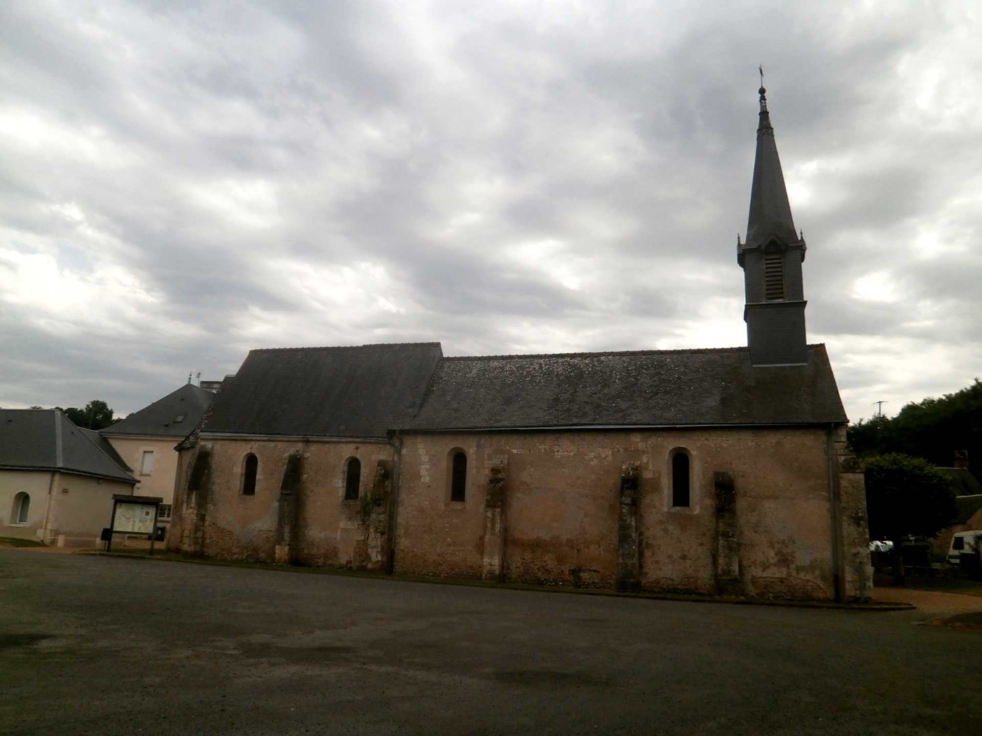 L'église de Crotelles